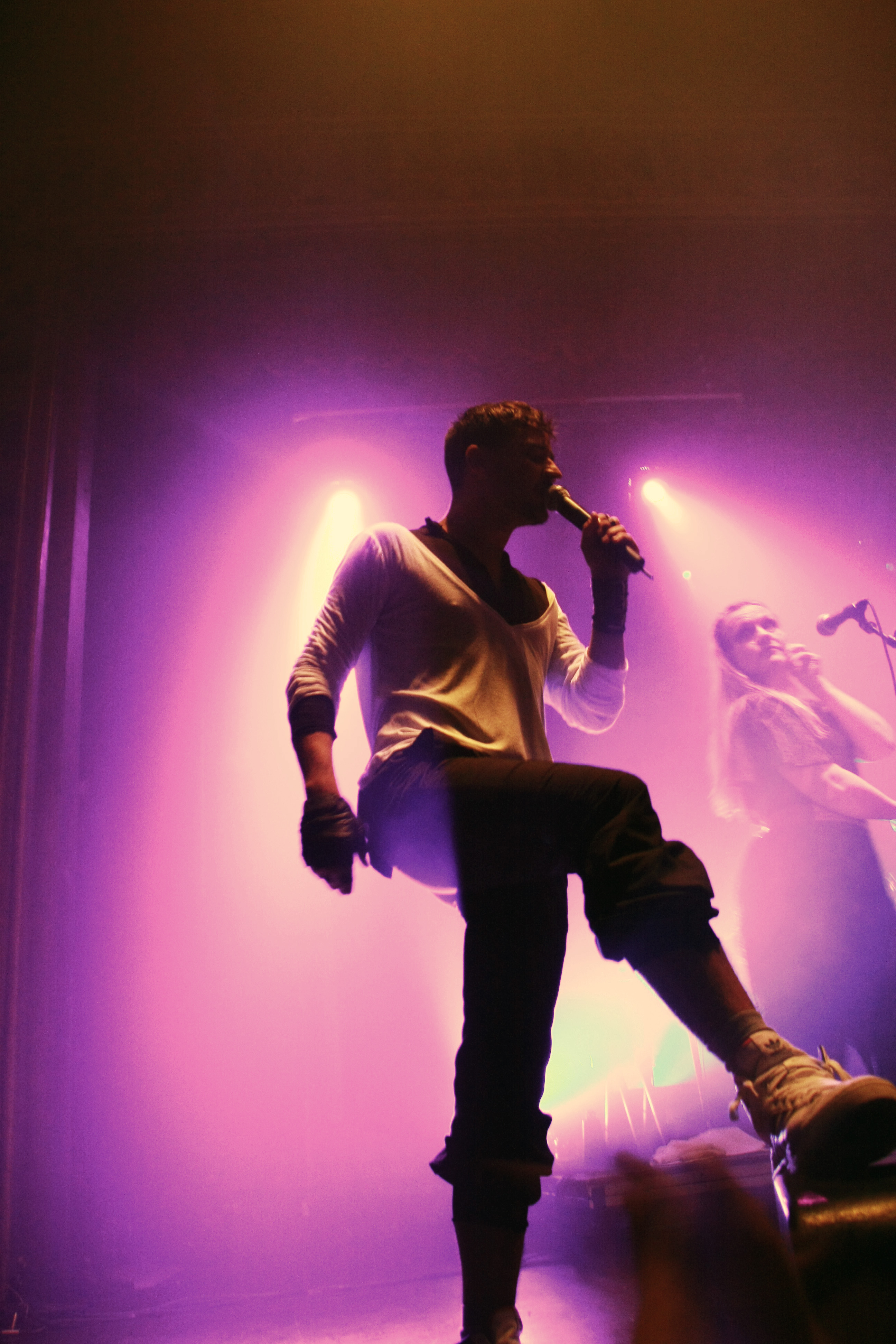 Svein Berge of Röyksopp @ Arvikafestivalen 2009 in Sweden